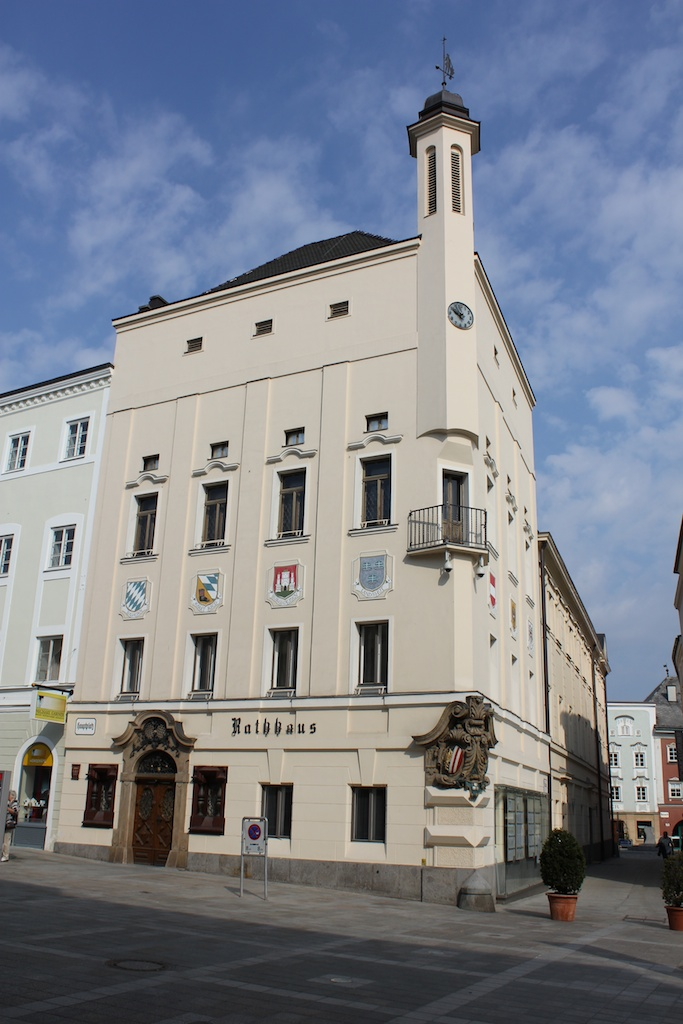 Rathaus